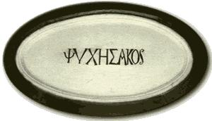 Η πινακίδα ΨΥΧΗΣ ΑΚΟΣ (Θεραπεία Ψυχής) που υπήρχε στην είσοδο της βιβλιοθήκης της Μηλιώτικης Σχολής.